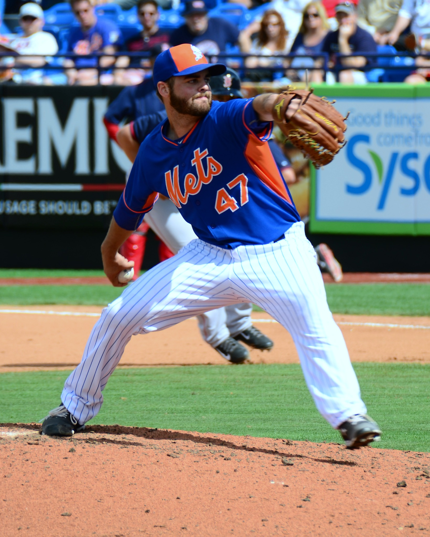 Cory Mazzoni